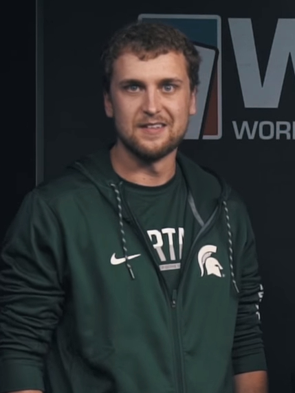 Ryan Riess nach seinem Sieg beim Seminole Hard Rock Poker Finale